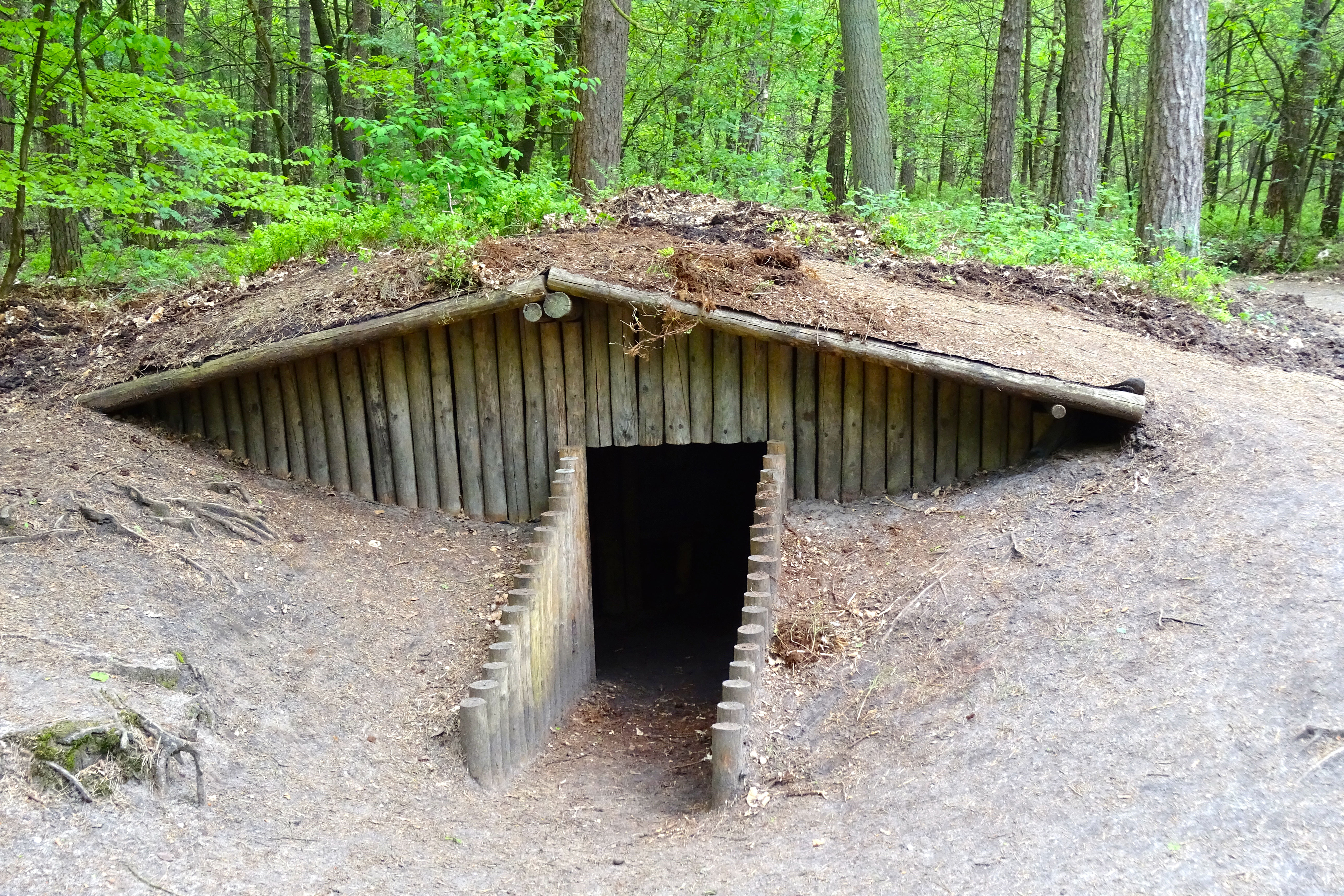 Een van de drie nagebouwde schuilhutten van het verscholen dorp, voor Joodse en andere onderduikers tijdens de Tweede Wereldoorlog